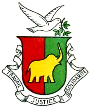 Герб Гвинеи в 1958-1984 годах Shown in different colors in Guide to the Flags of the World by Mauro Talocci, revised and updated by Whitney Smith (ISBN 0-688-01141-1).